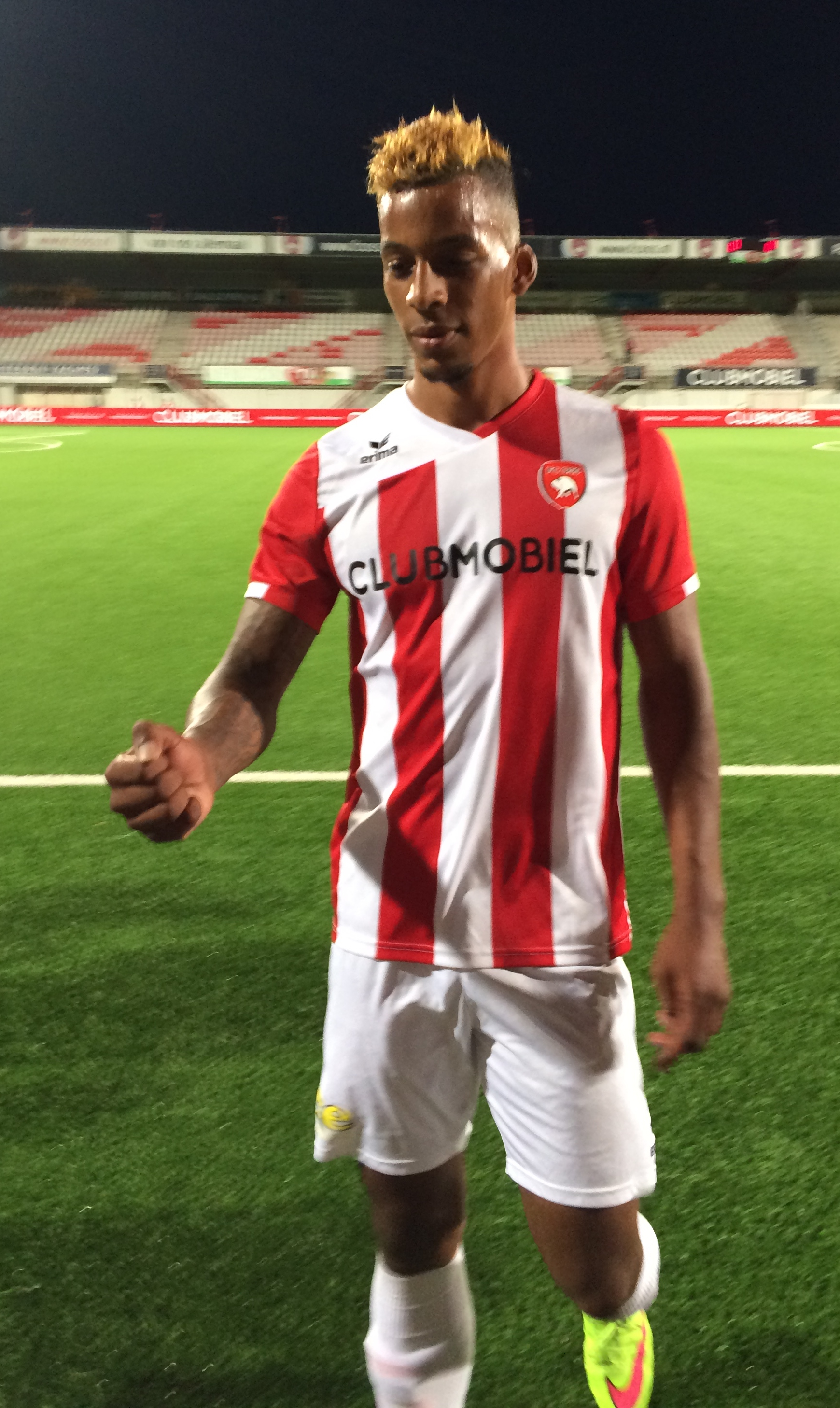 Voetballer Irvingly van Eijma spelend voor Fc Oss 2015-2016